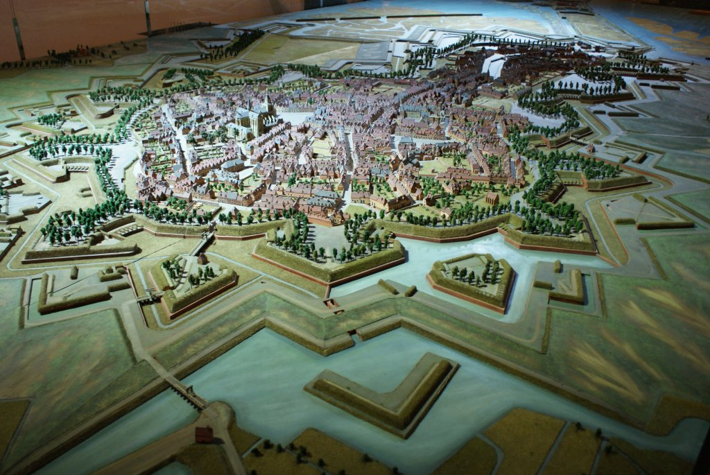 Maquette Bergen op Zoom 1747 (Sterkste vesting van de Republiek der Verenigde Nederlanden)